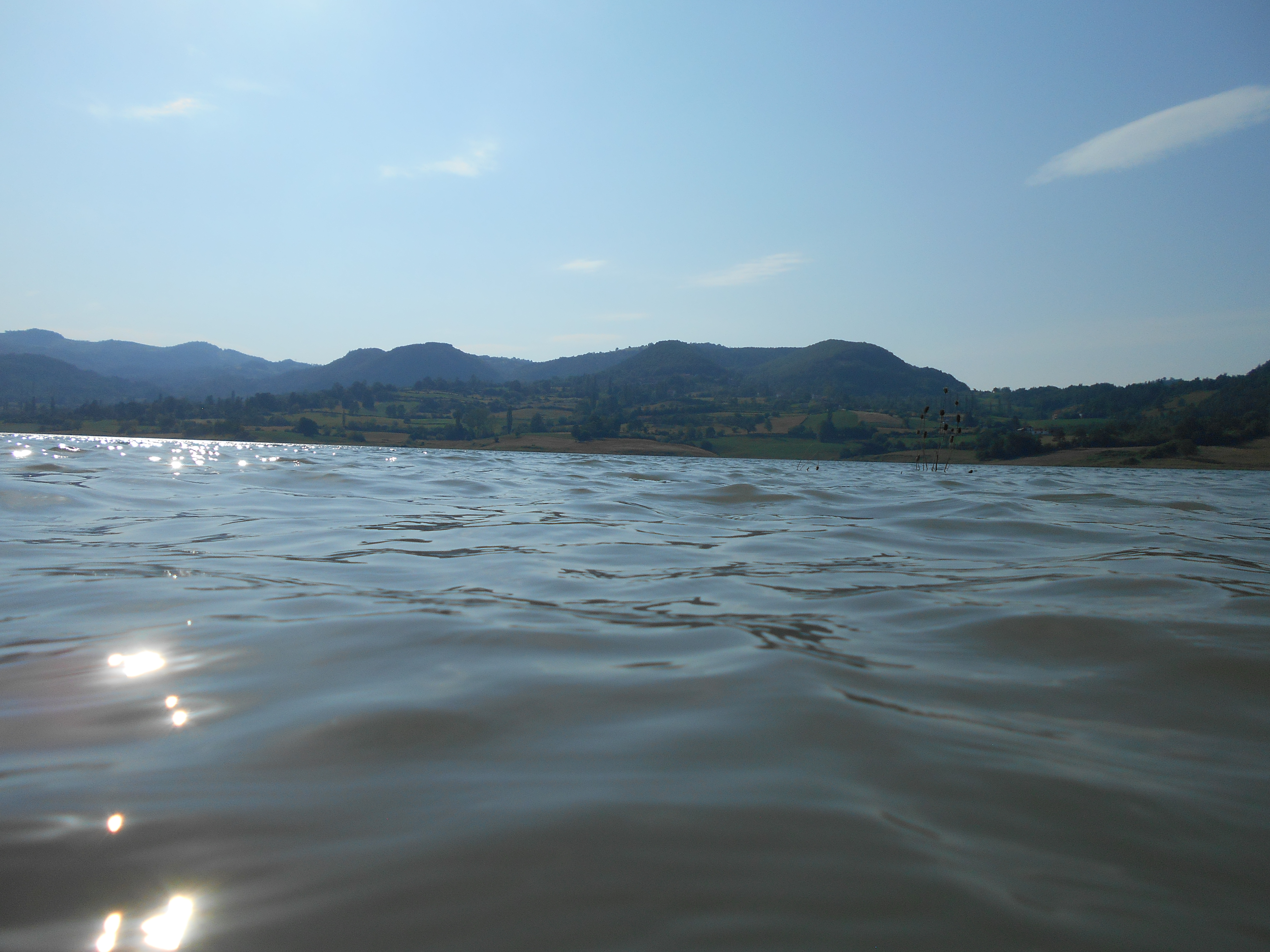 Talasi na jezeru